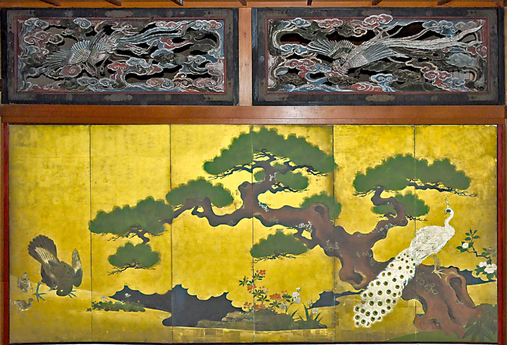 太閤山荘 太閤の間 金屏風と欄間